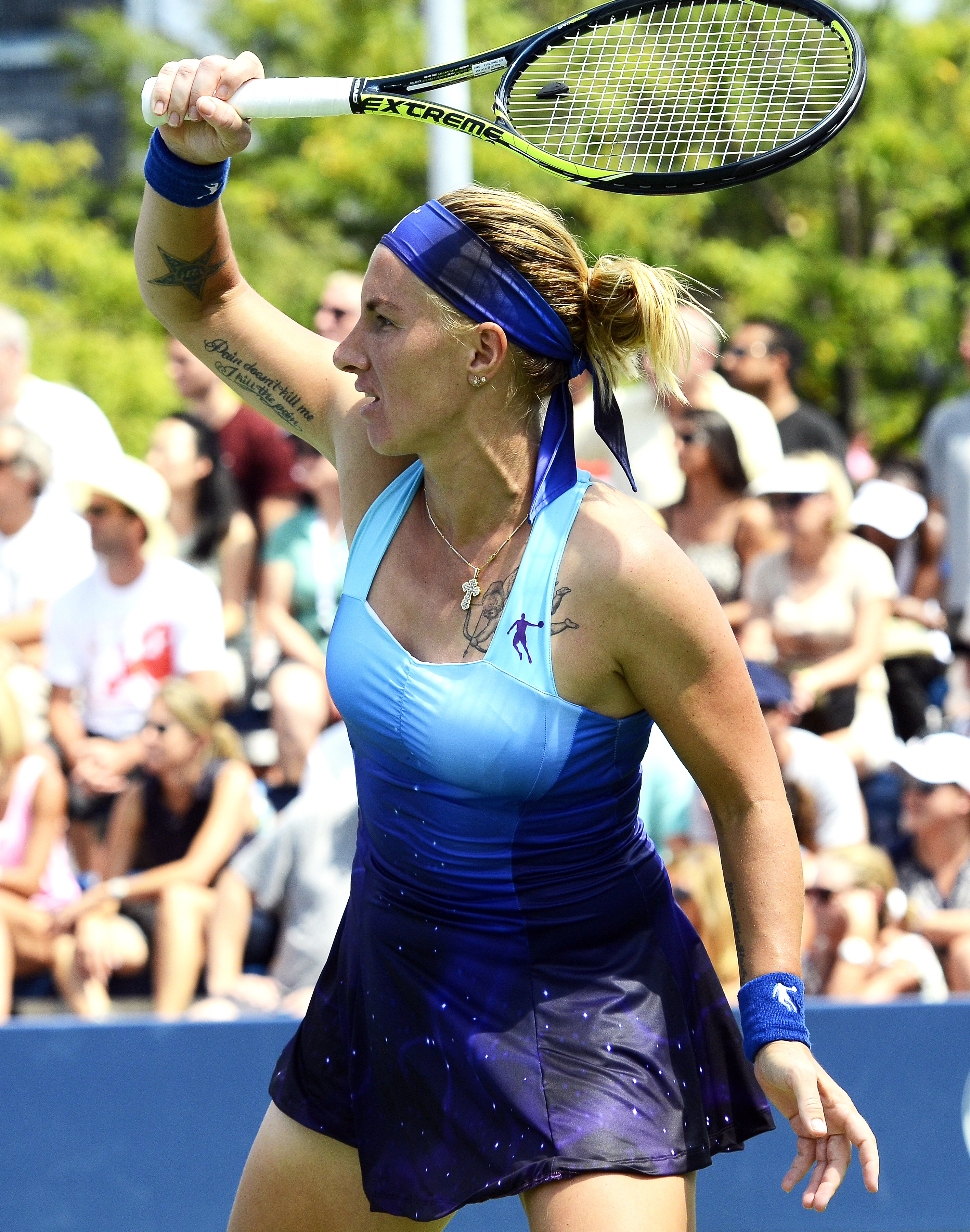 August 26, 2014 Queens, NY Marina Erakovic (NZL) def. Svetlana Kuznetsova (RUS)